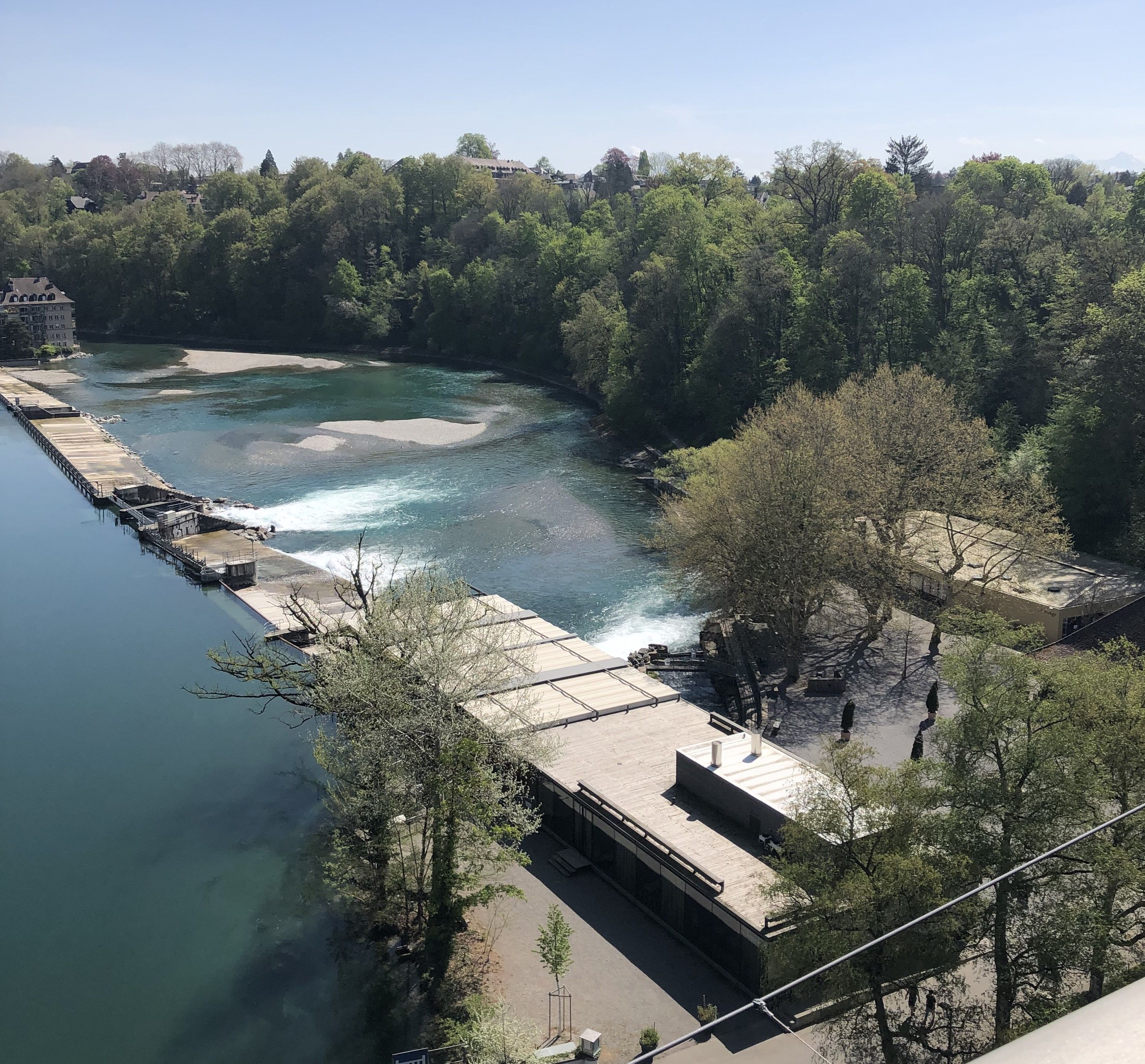 Schwellenmätteli von Kirchenfeldbrücke